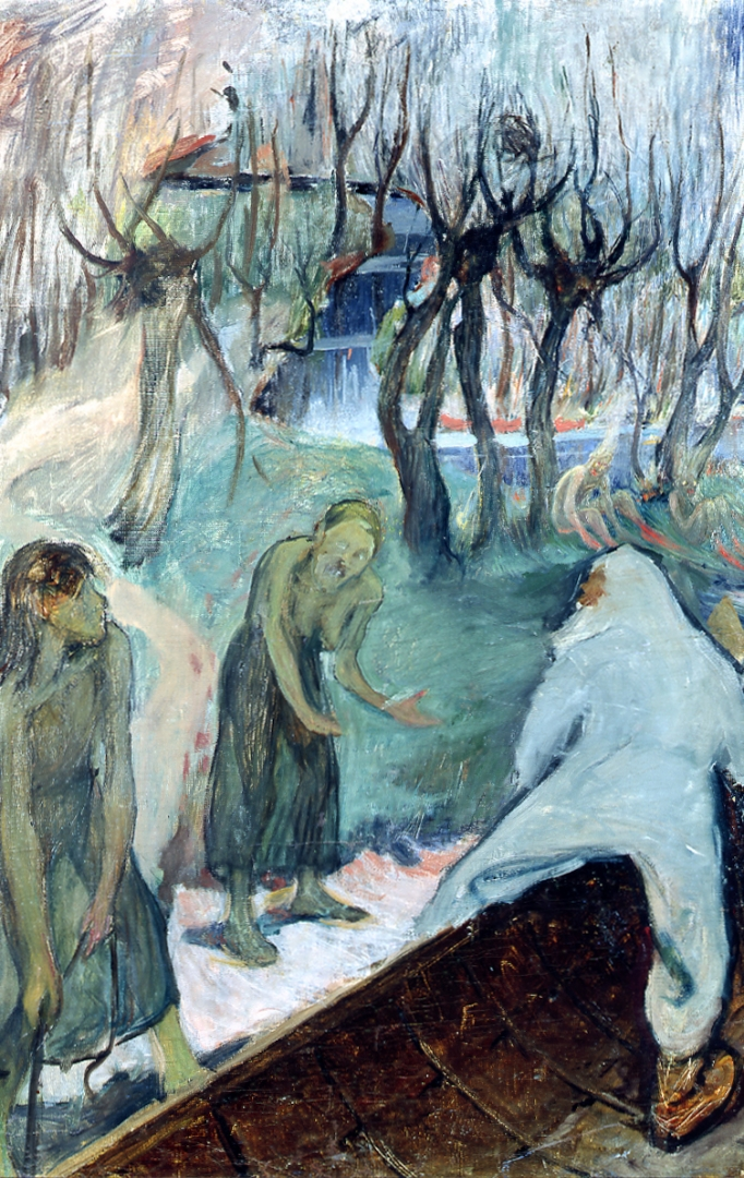 Väinämöinen visits Tuonela.